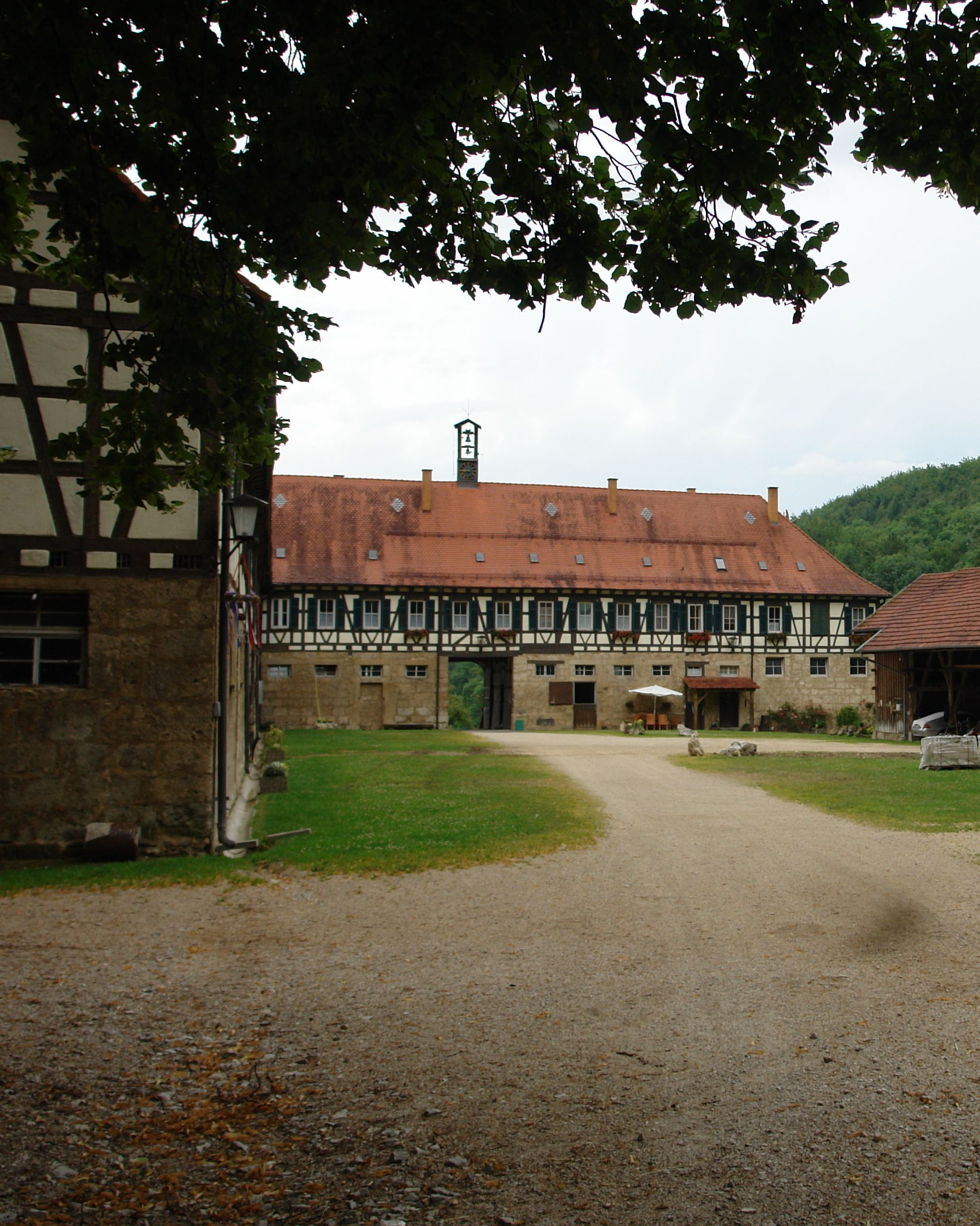 ehemaliges Kloster zum Fuß der Gütersteiner Wasserfälle, vom Hof nach aus aufgenommen